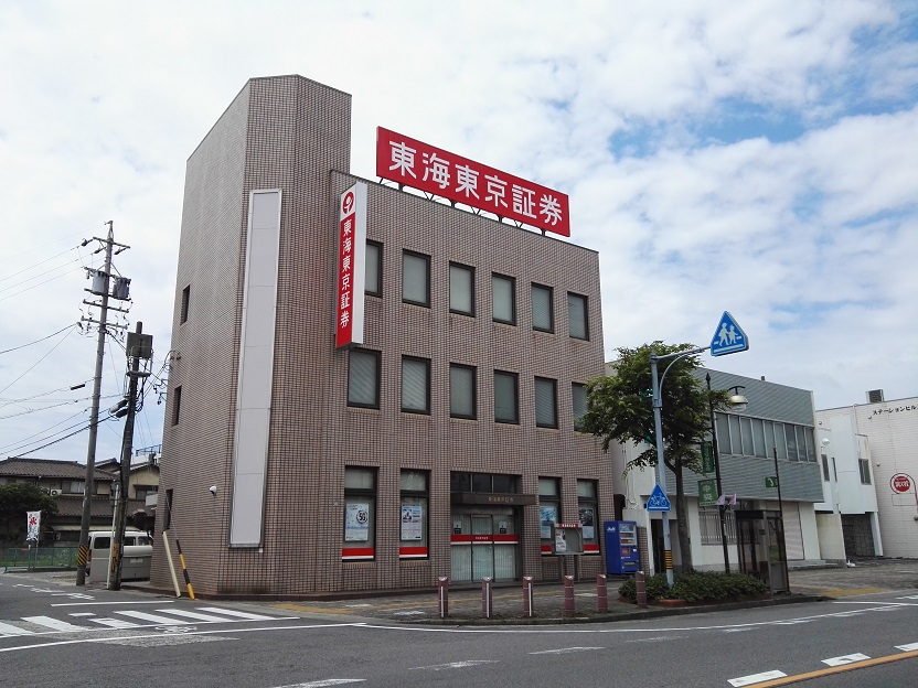 Tokai Tokyo Securities Hekinan branch, Aichi